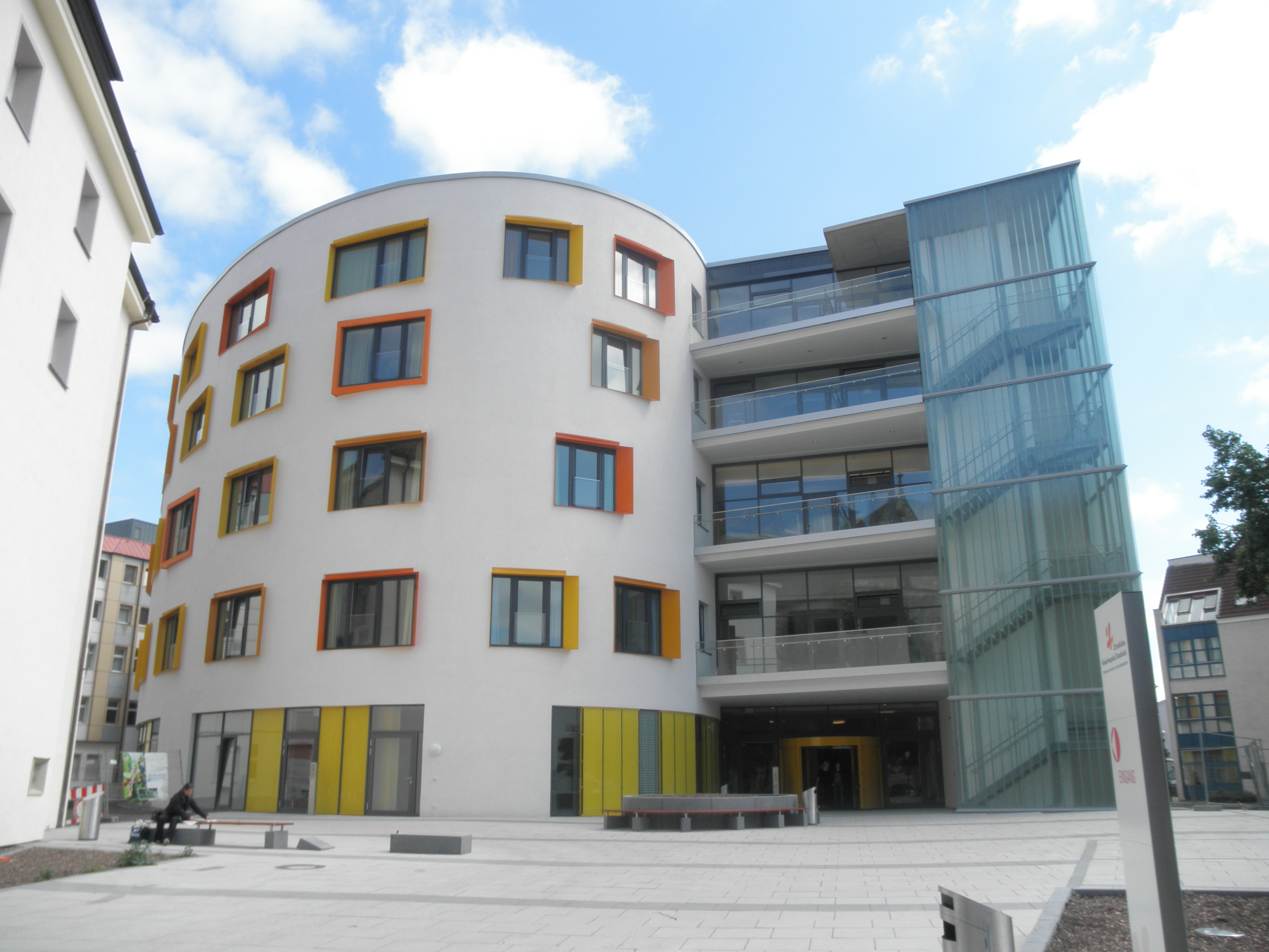 Kliniko Marienhospital Osnabrück